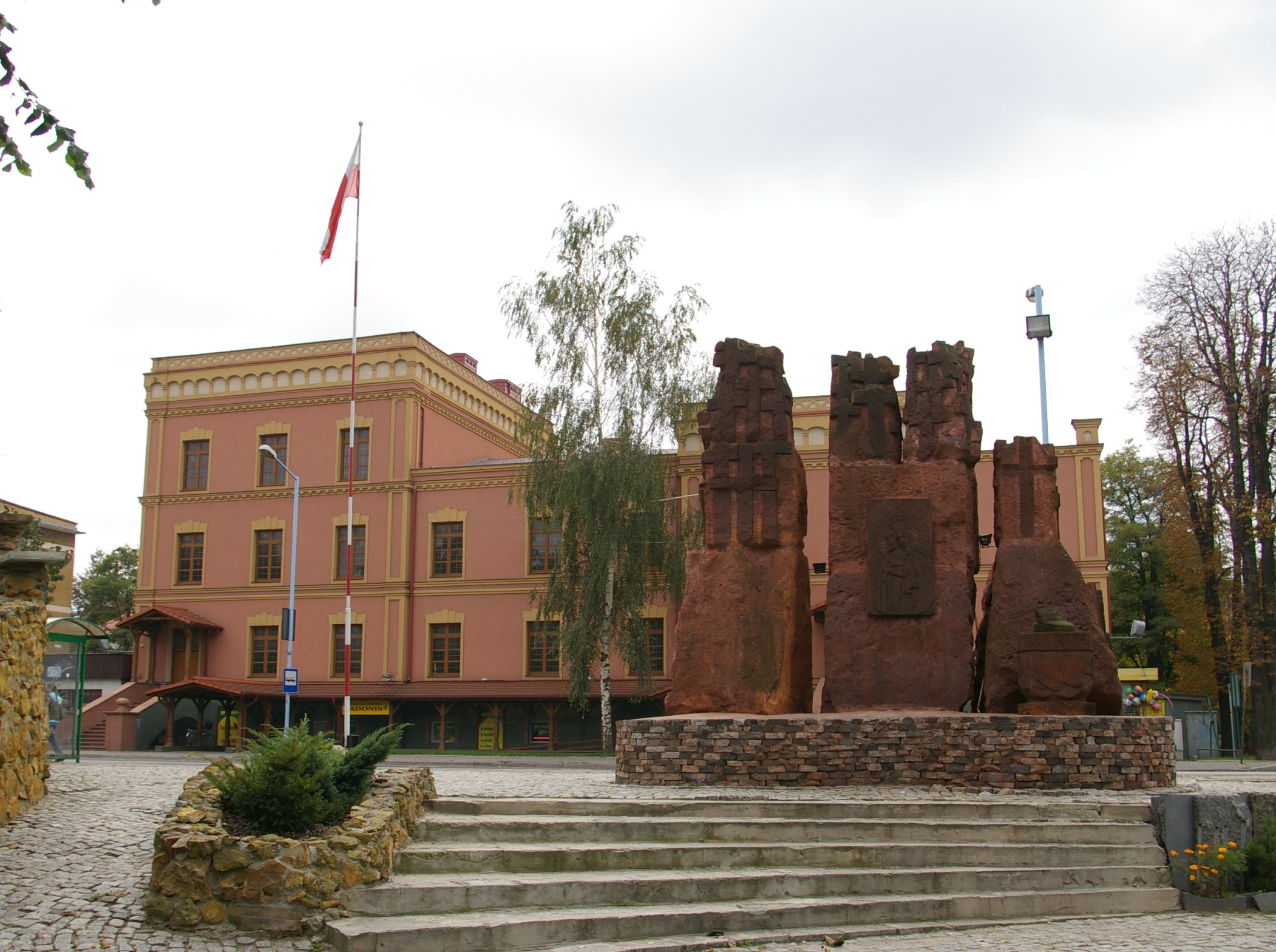 Pomnik Ofiar Zbrodni Katyńskiej i dawny Hotel Fabryczny w Ostrowcu Świętokrzyskim